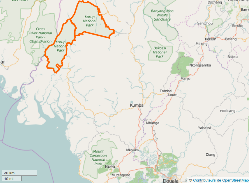 Situation et limites du Parc National de Korup au Cameroun (OSM). This map may be incomplete, and may contain errors. Don't rely solely on it for navigation.